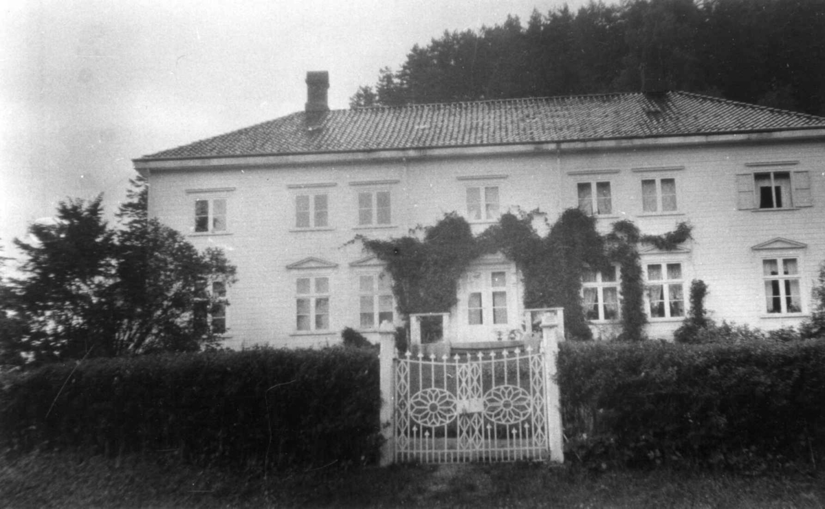 Forvalterboligen på Egelands jernverk, Gjerstad i Aust-Agder. Fotografiet tilhører Norsk Folkemuseum